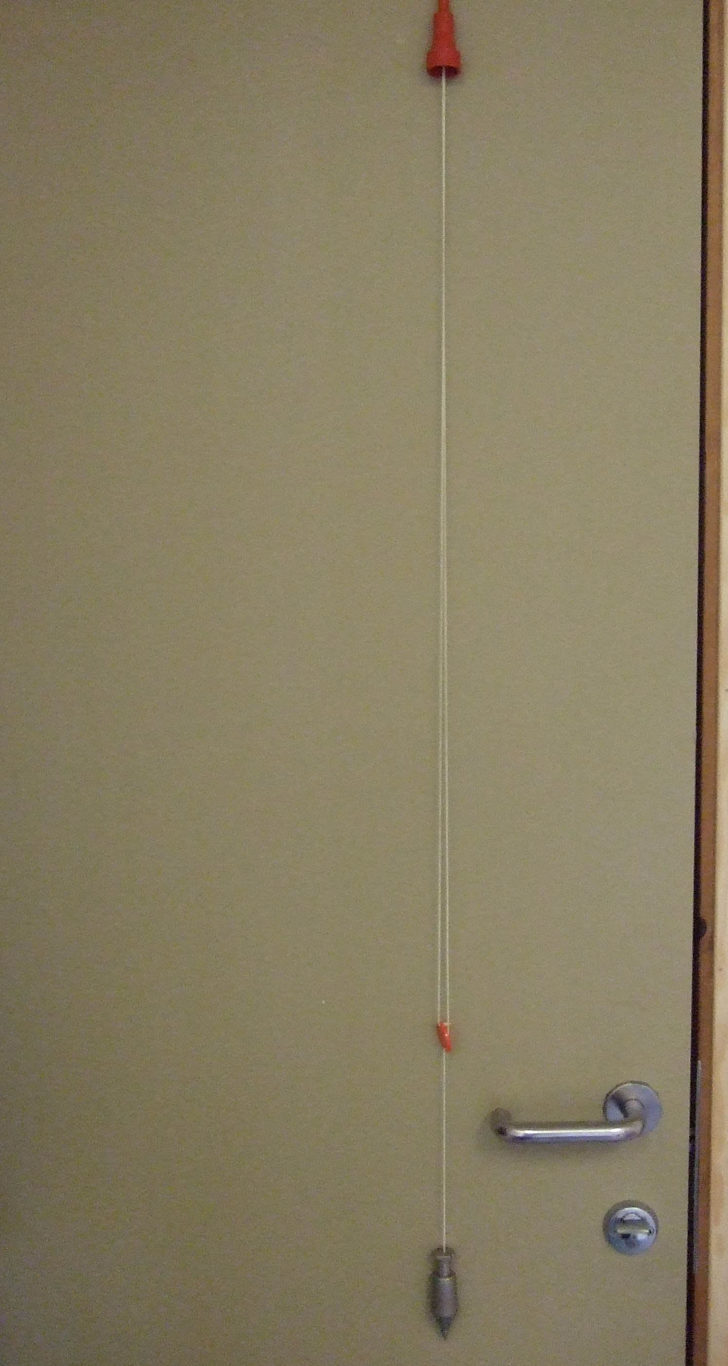 Loddsnor